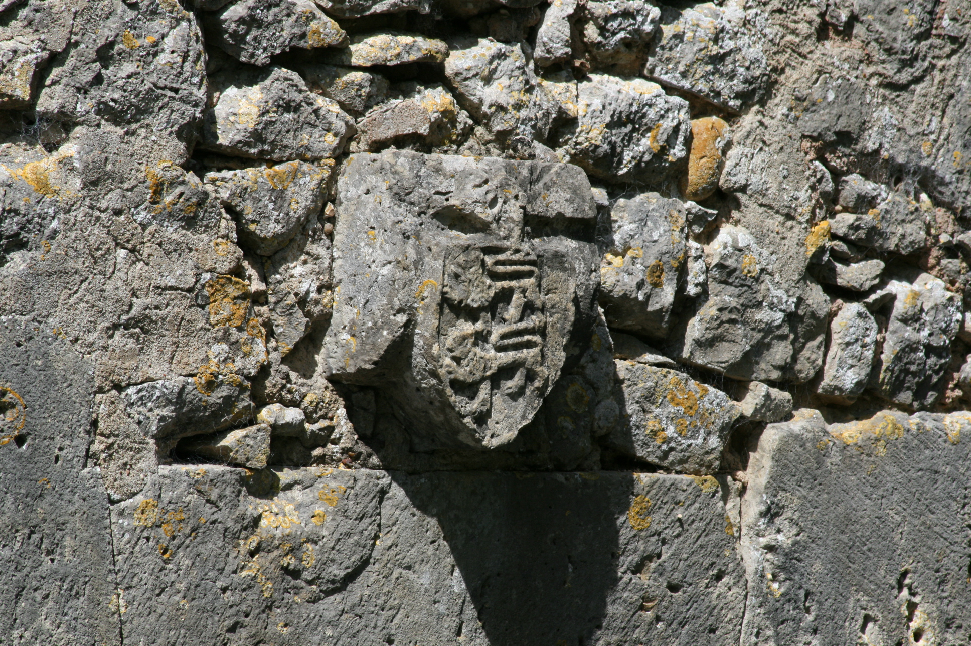 Pont du Gril de Corbelin – Commune de Griselles – Département du Loiret – France – Pont de la fin du XIIème - début du XIIIème siècle